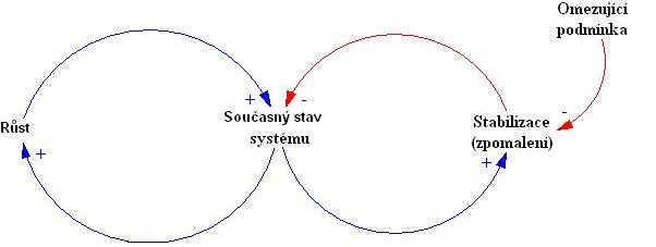 popis Archetypu "Meze růstu". Vyrvořen v programu Vensim 6.0 PLE